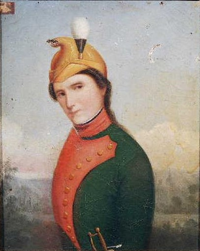 Thérèse Figueur, dite "Mme Sans-Gêne", (1774-1861) dragon dans les armées de la République et de l'Empire